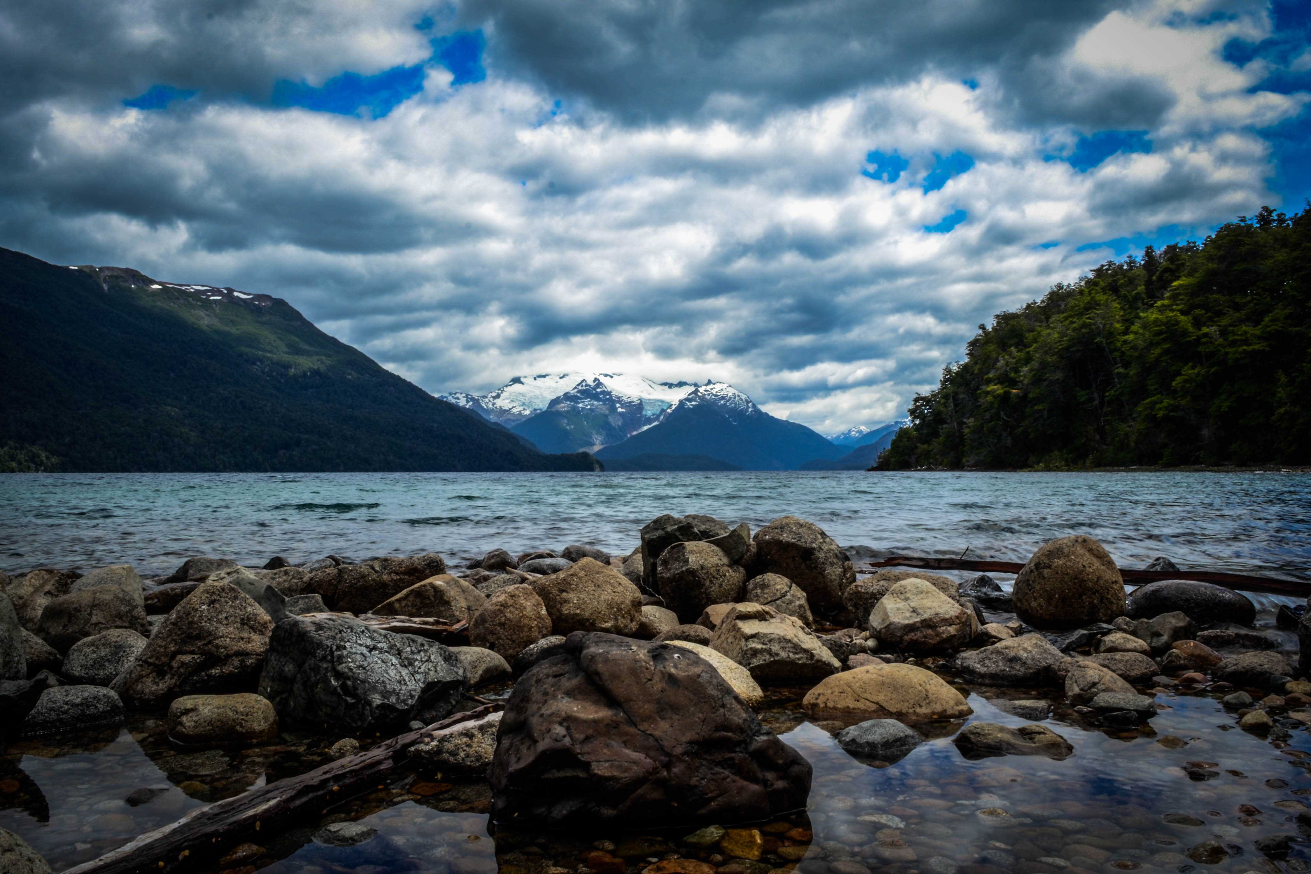 Cerro de los tres picos - Parque Los Alerces.jpg